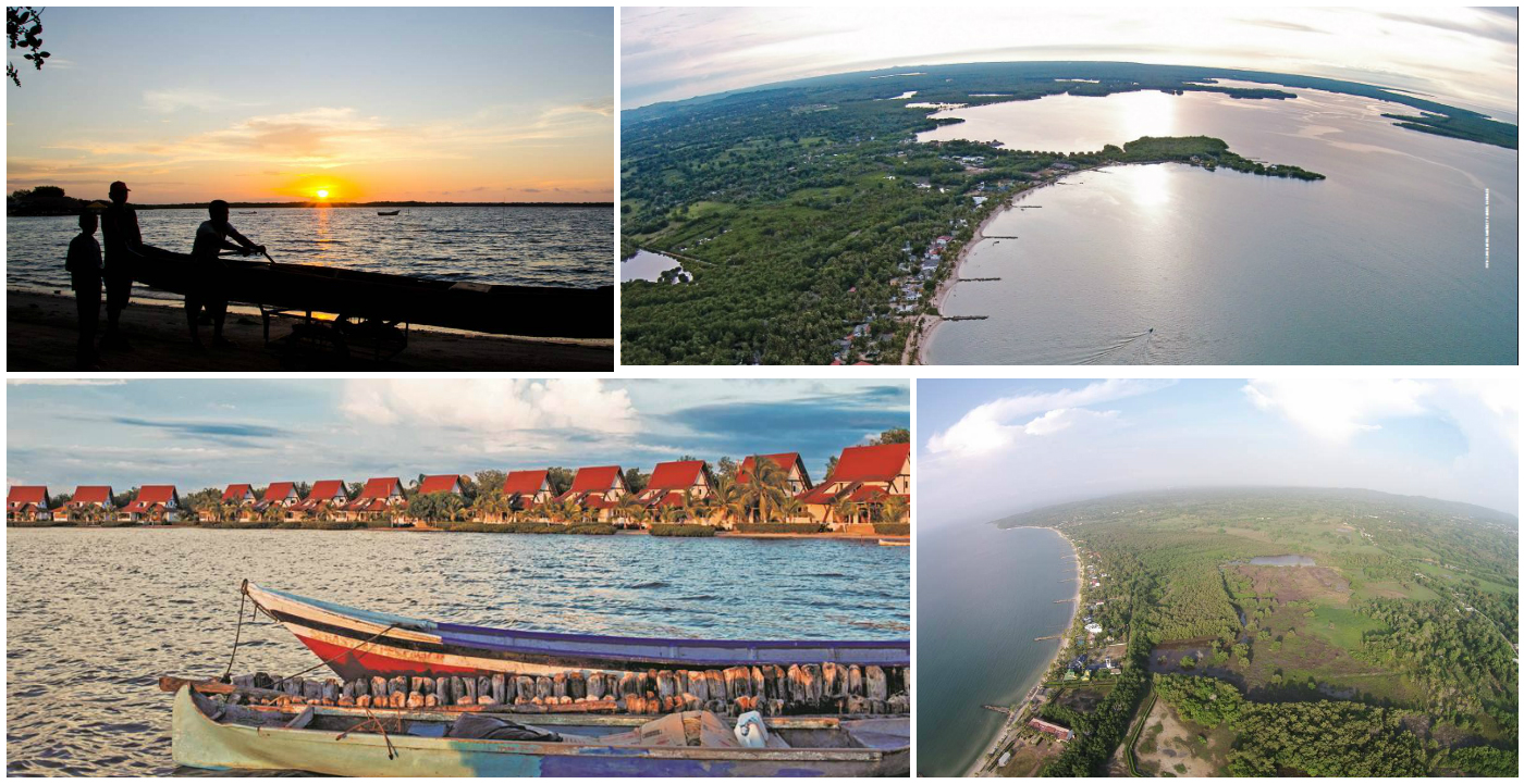 Vistas Bahia De Cispata